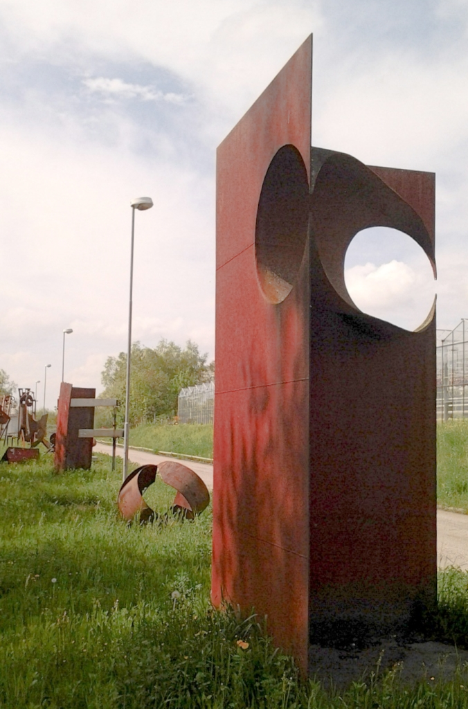 Skulpturen im Stahlpark Riedersbach, Gemeinde St. Pantaleon, Oberösterreich.